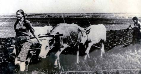 Пахота на волах